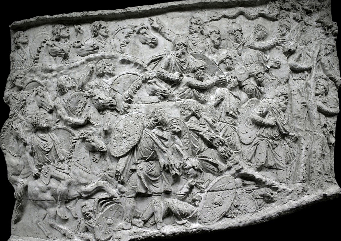 Moulage de la frise de la colonne Trajane, exposé au Museo della Civiltà Romana, Rome. Cavalerie maure de Lusius Quietus